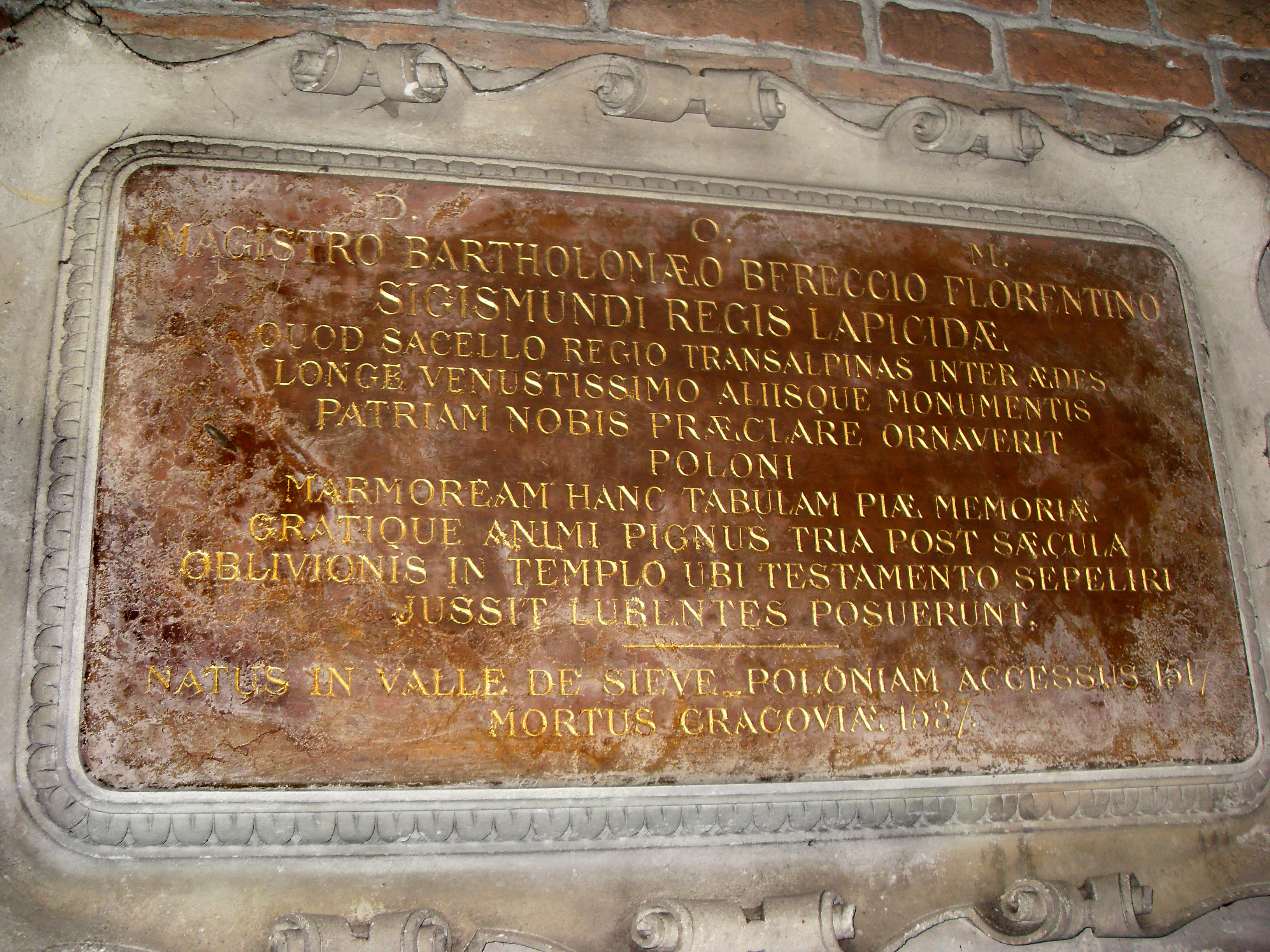 Epitafium B. Berrecciego z kościoła Bożego Ciała na krakowskim Kazimierzu.